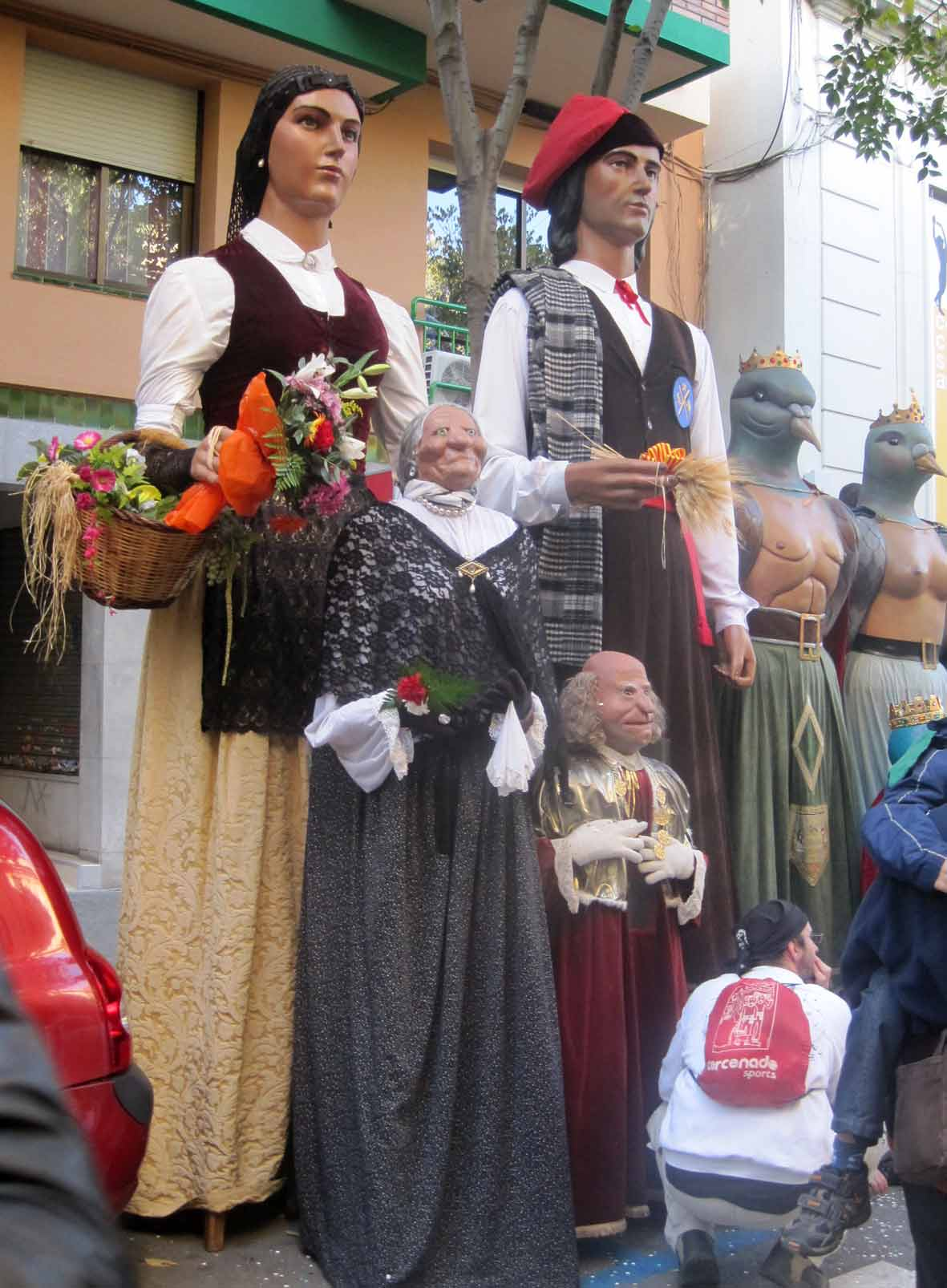 Џинови, фигуре обично направљене од дрвета и картона.